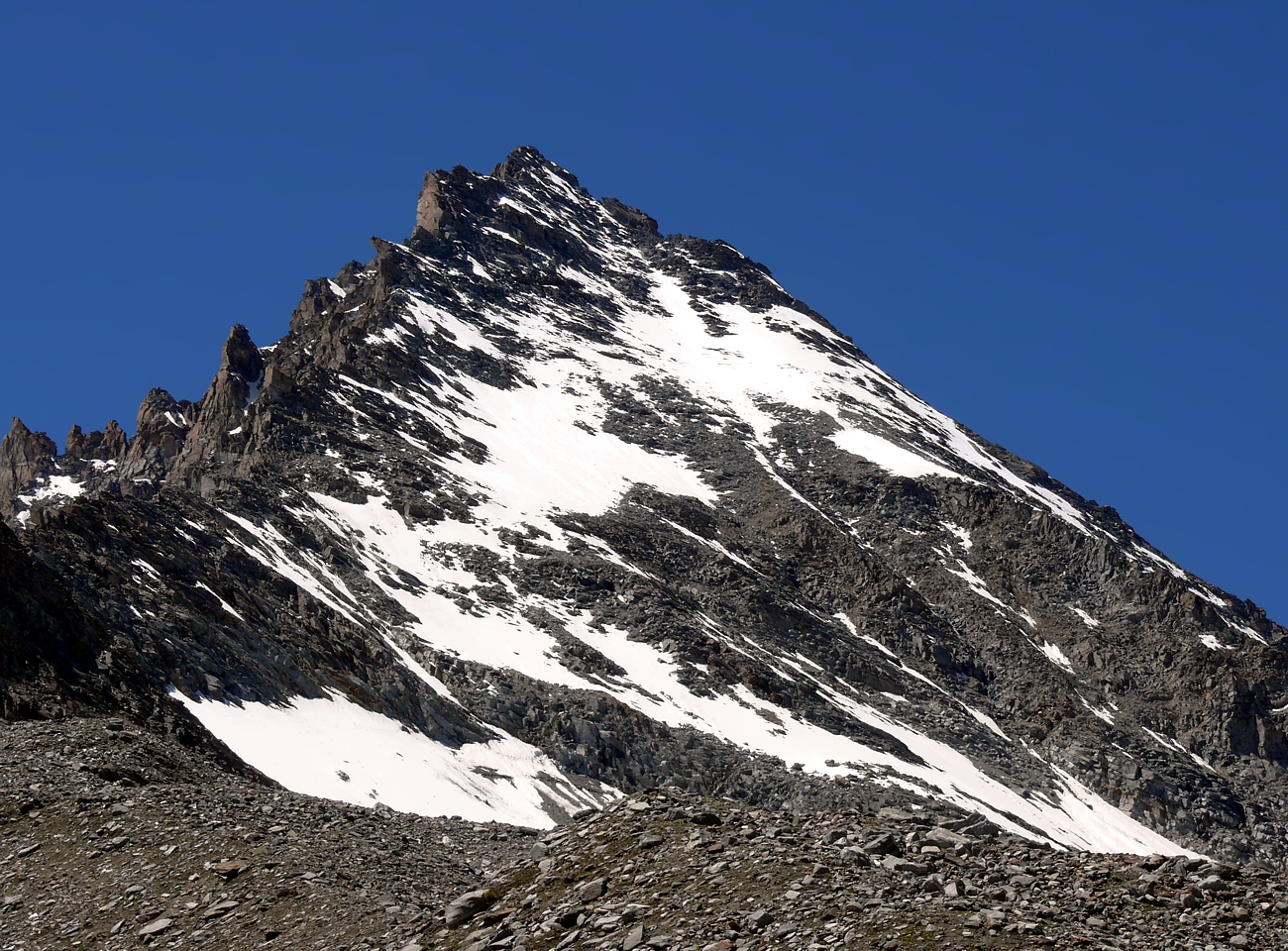 l'Herbetet - Alpi Graie - Italy